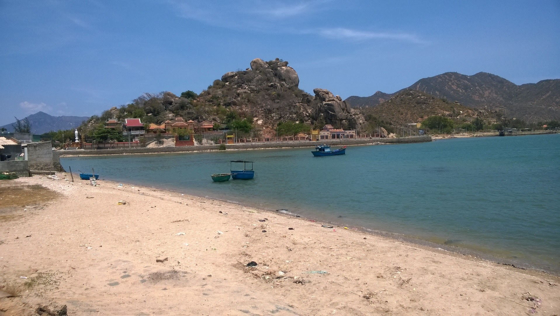 Đầm Nại, Ninh Hải, Ninh Thuận